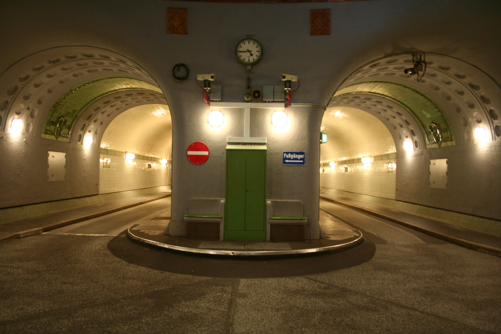 Alter Elbtunnel, Eingang Steinwerder This is a photograph of an architectural monument.